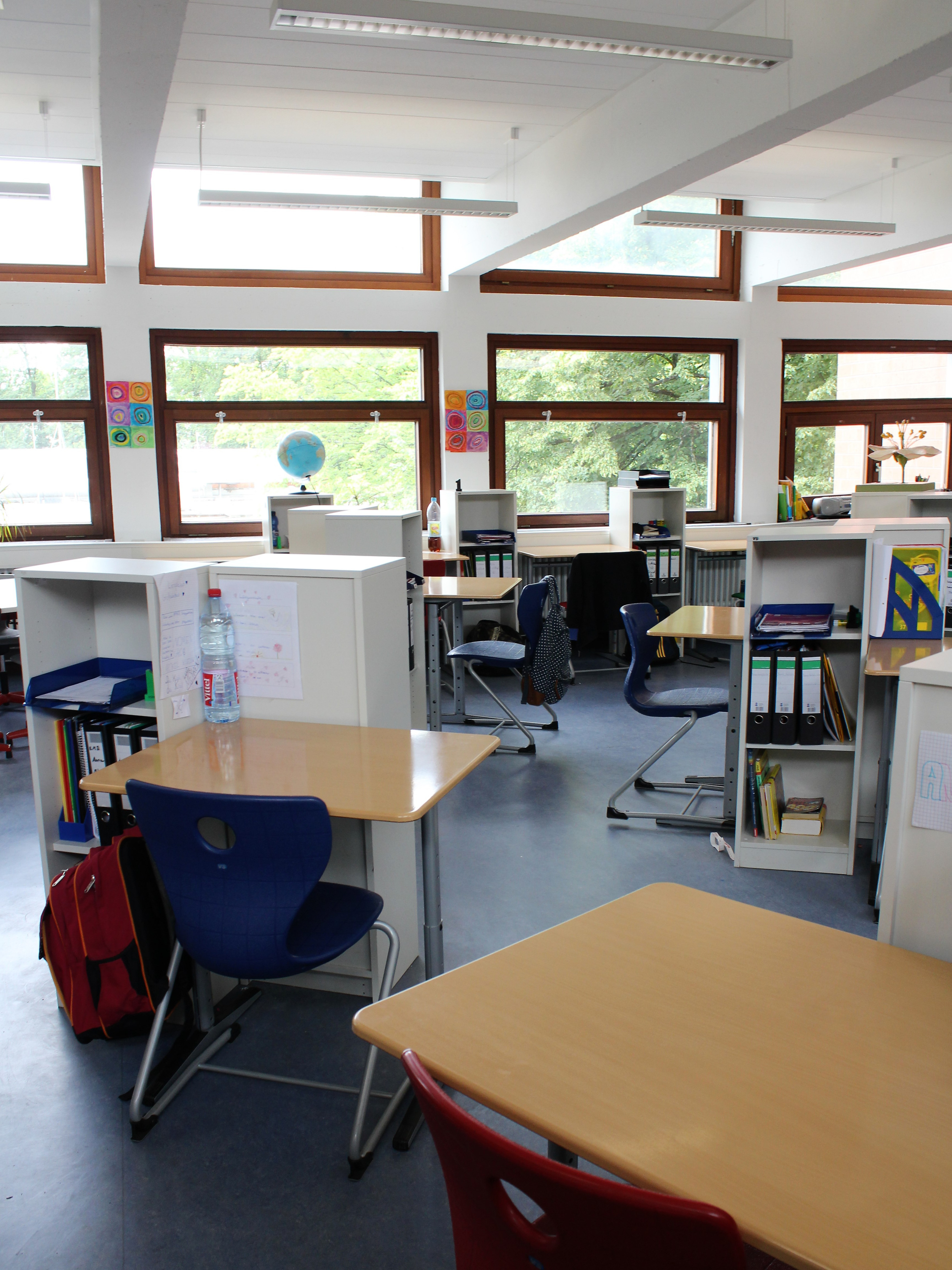 Gemeinschaftsschule „Waldparkschule“ in Heidelberg-Boxberg: Blick in eines derjenigen Klassenzimmer der Schule, die als „Lernbüros“ mit einzelnen Schülerarbeitsplätzen ausgestattet sind.